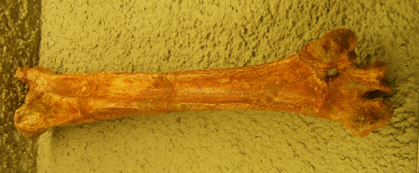 Fossil of Tyto gigantea, an extinct barn owl - Took the photo at Naturalis museum, Leiden